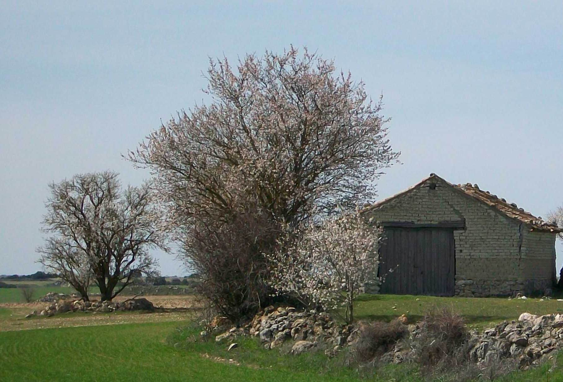 Almendros en flor junto a la tenada.